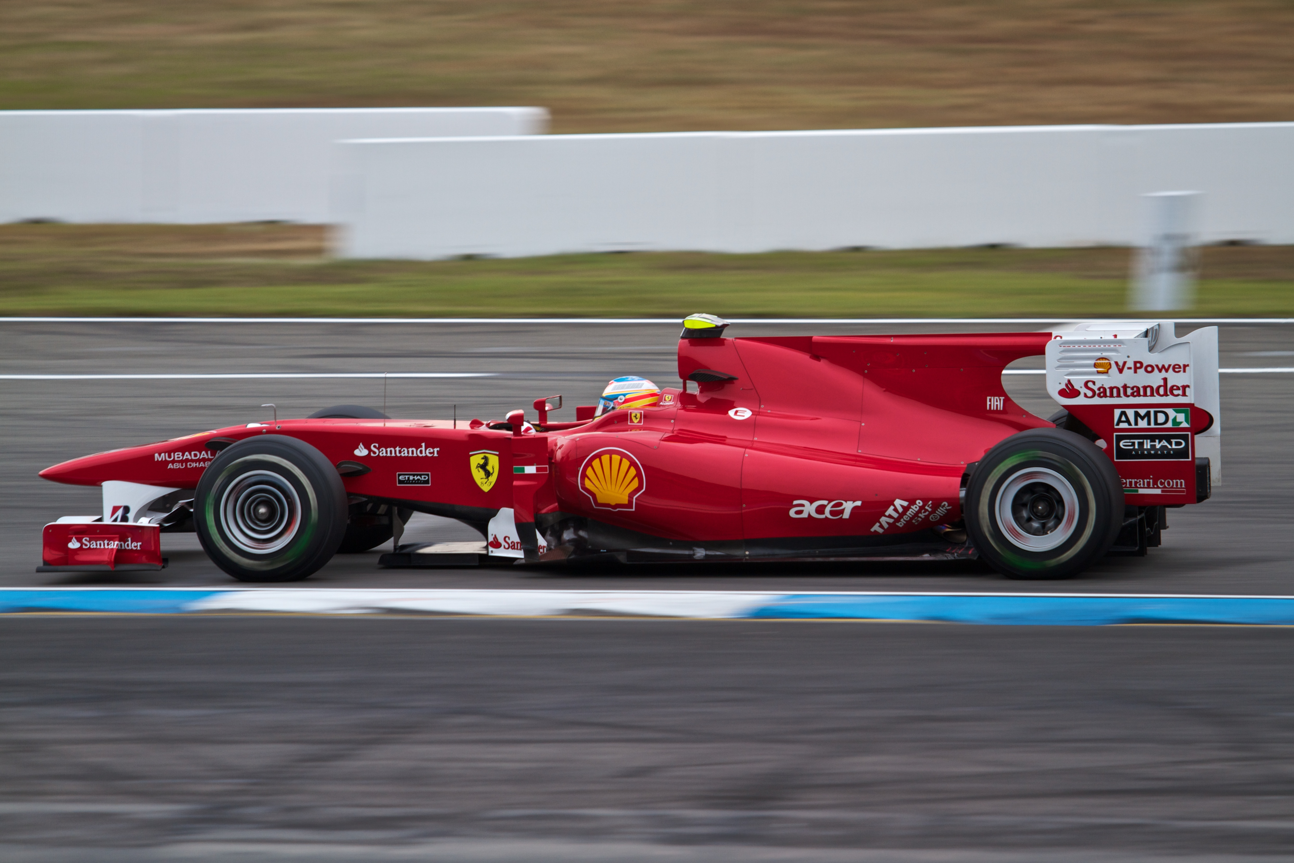 Fernando Alonso lors du Grand Prix d'Allemagne 2010 sur Ferrari F10